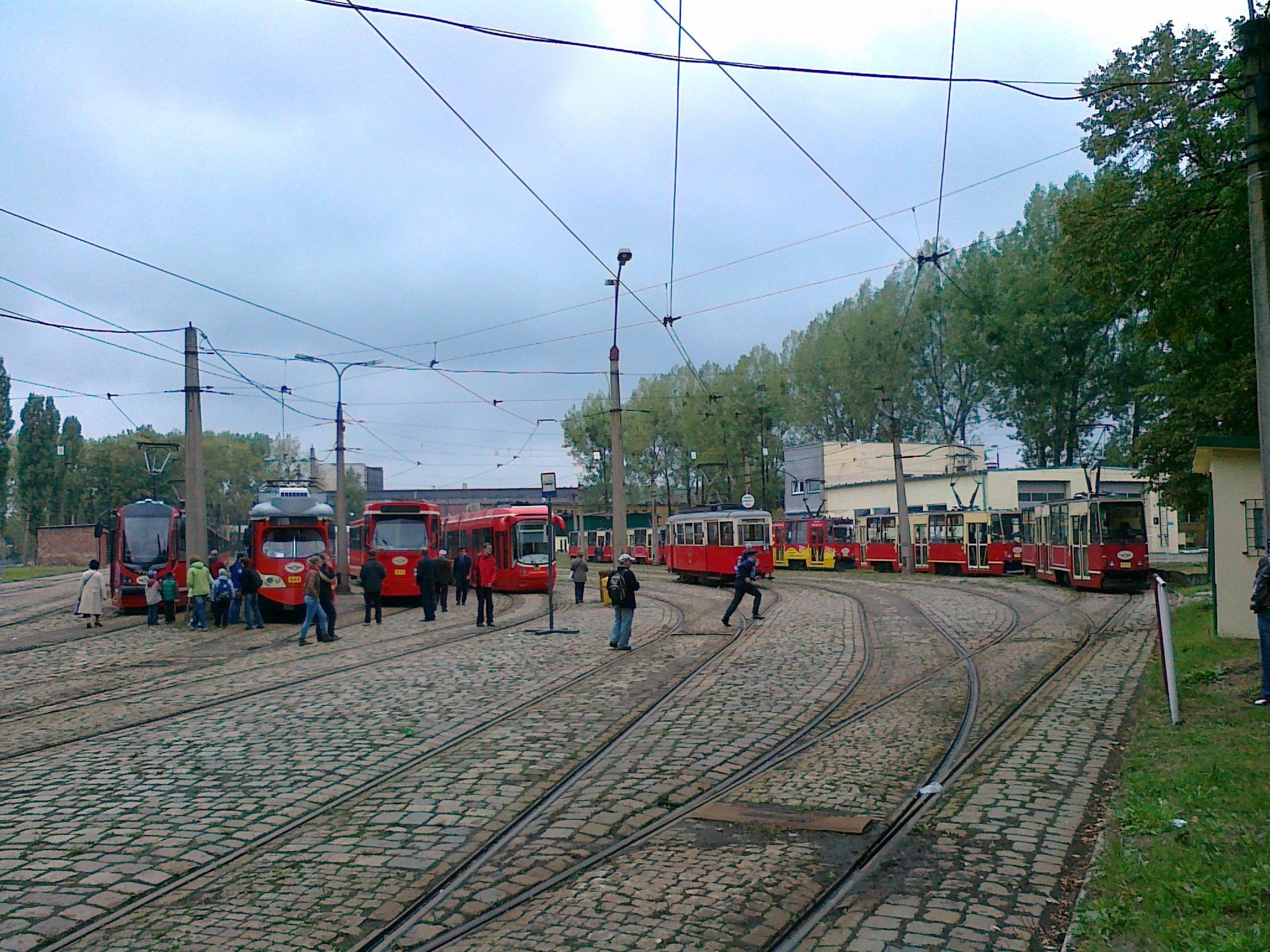 Dni otwarte Tramwajów Śląskich w zajezdni Stroszek w Bytomiu (2013-09-21)